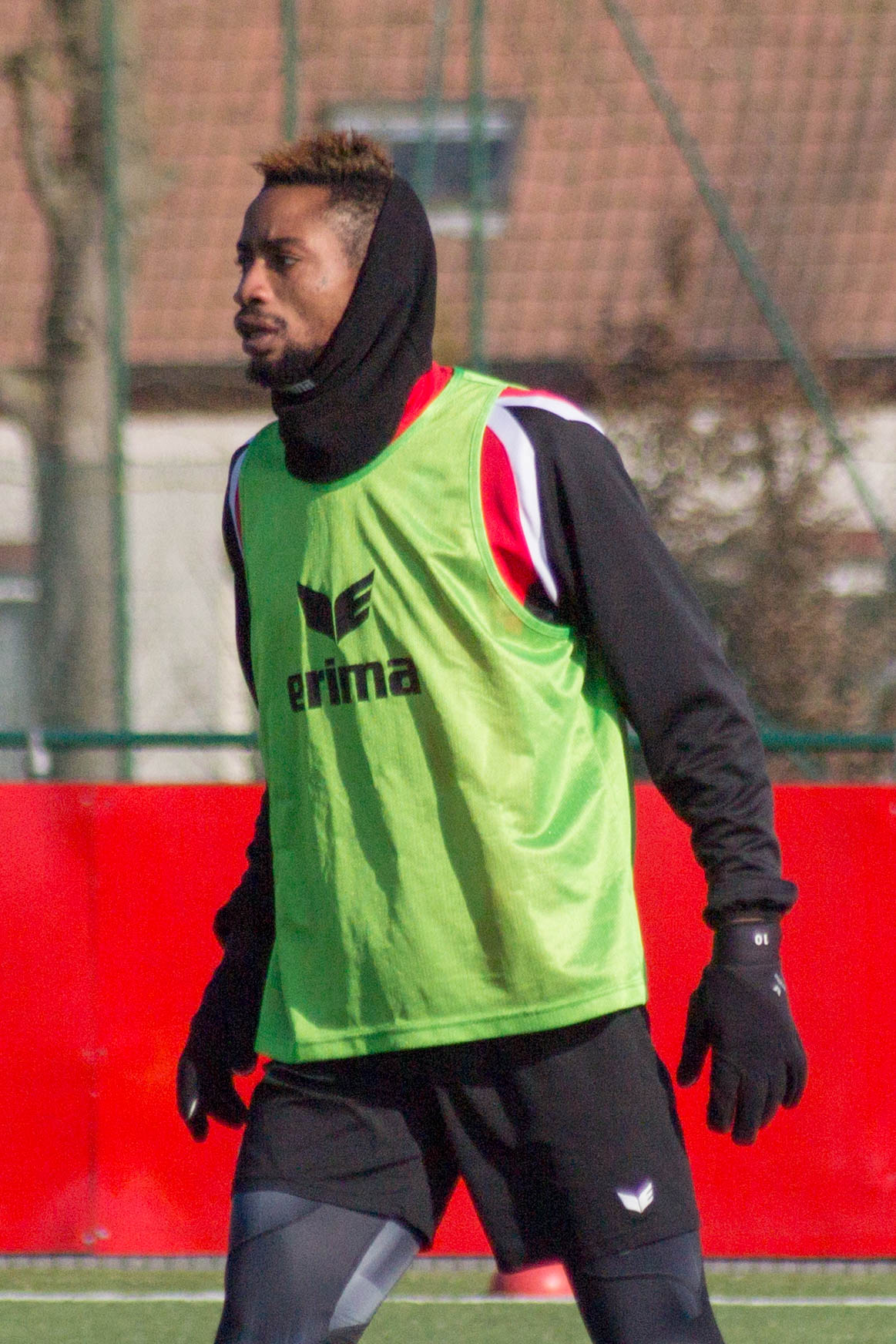 Entraînement du Royal Excel Mouscron, Futurosport, février 2018